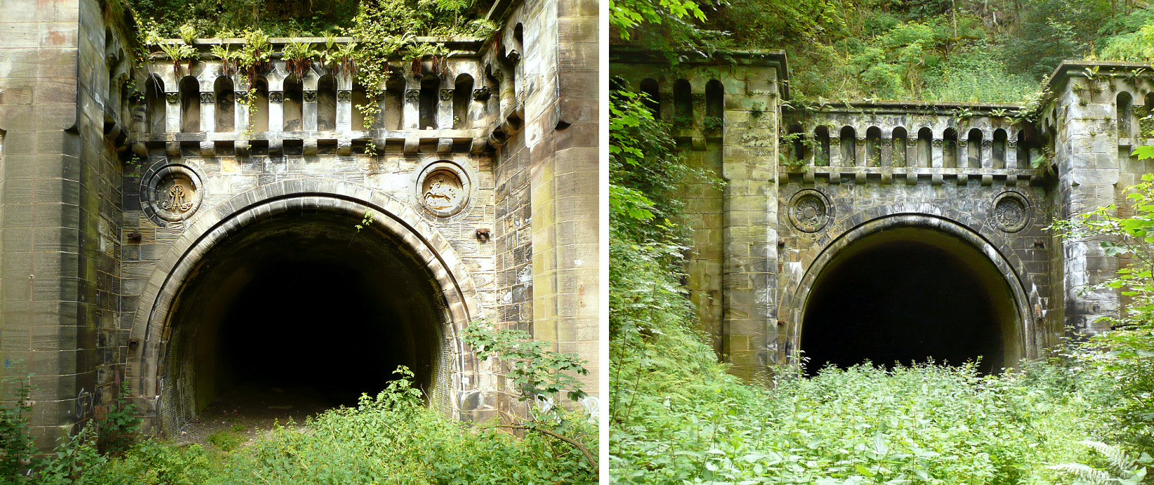 Volkmarshäuser Tunnel, links Südwestportal, rechts Nordostportal